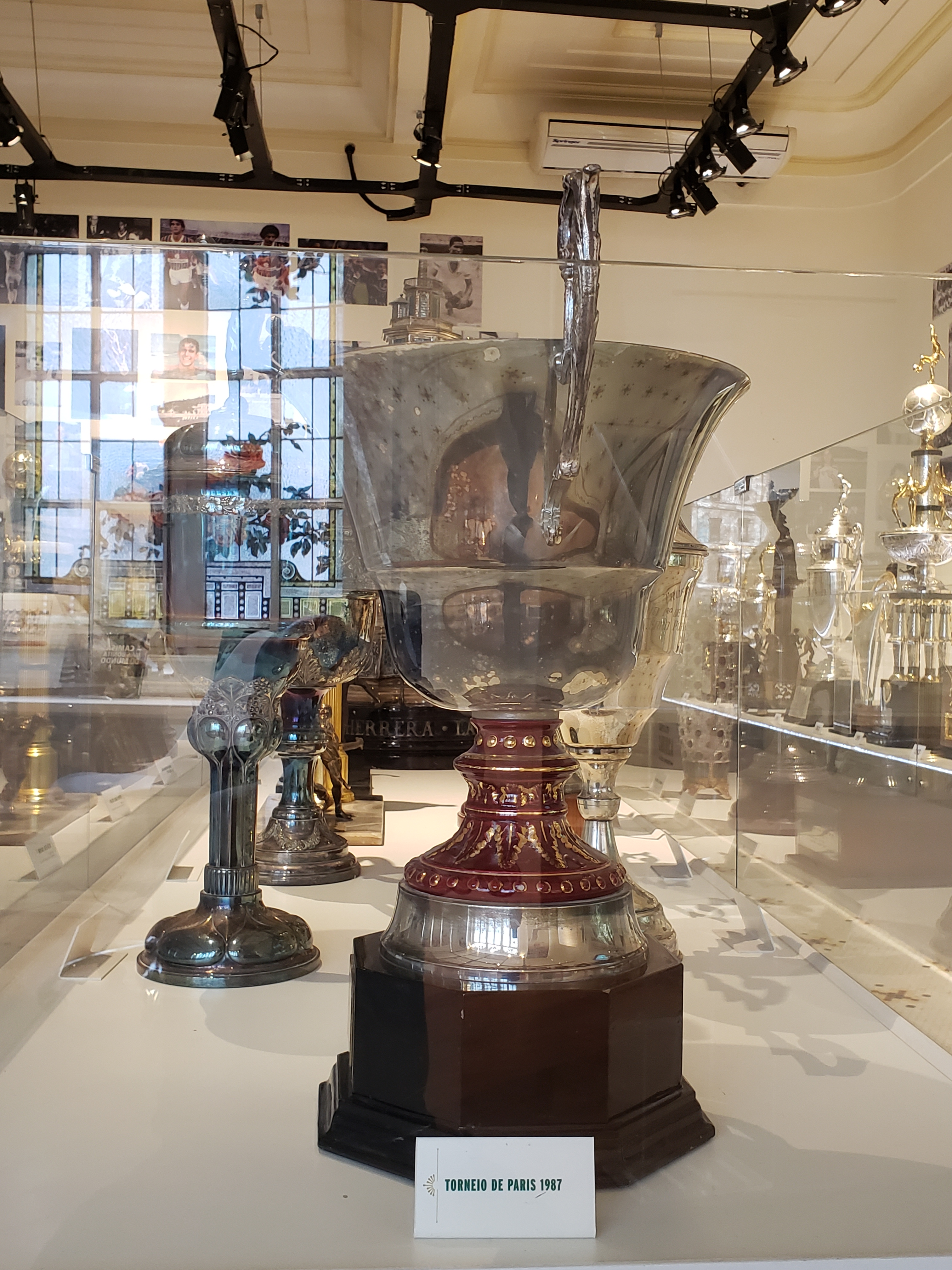 Torneio de Paris 1987, conquistado pelo Fluminense Football Club.